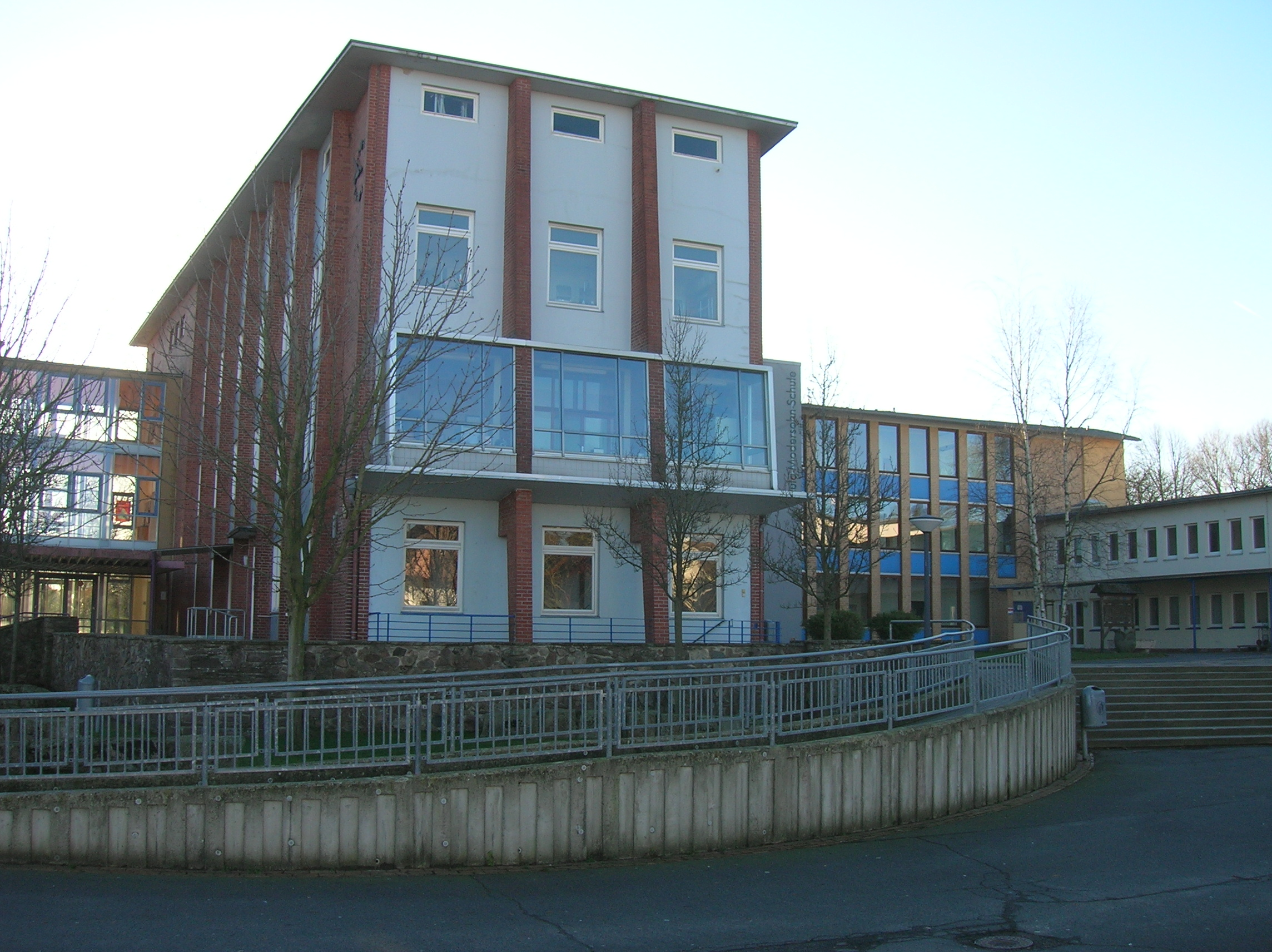 Mittelbau und Eingang der Paula-Modersohn-Schule in Bremerhaven-Wulsdorf.